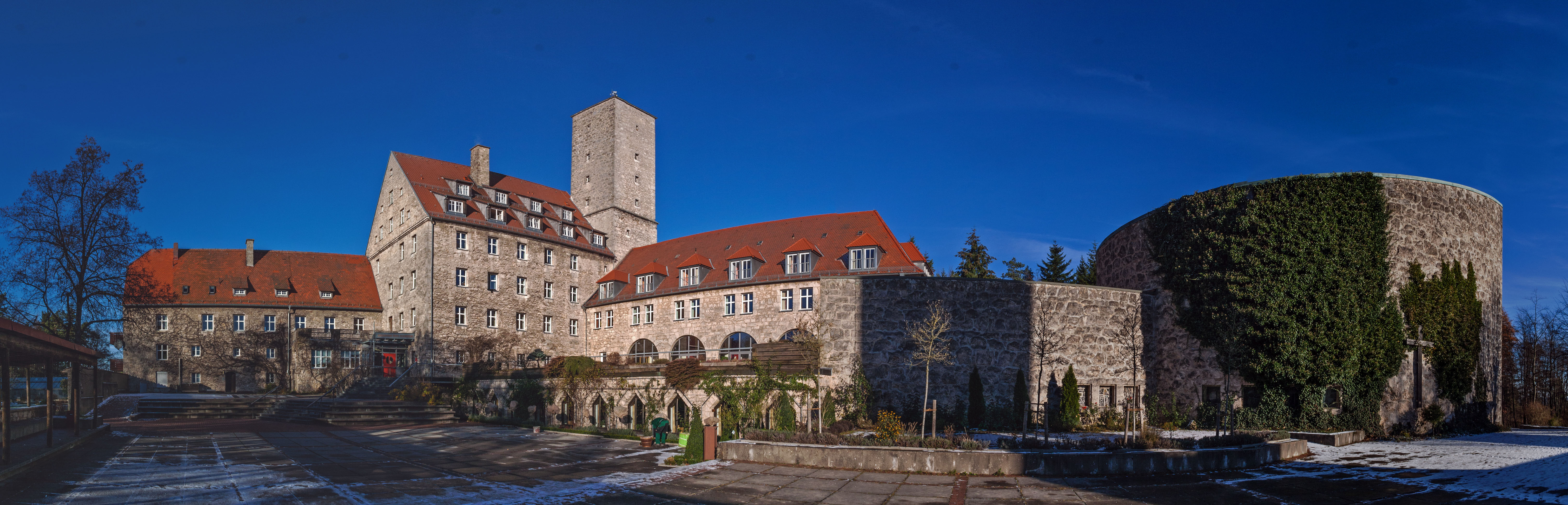 Burg Feuerstein, Panorama, Innenhof